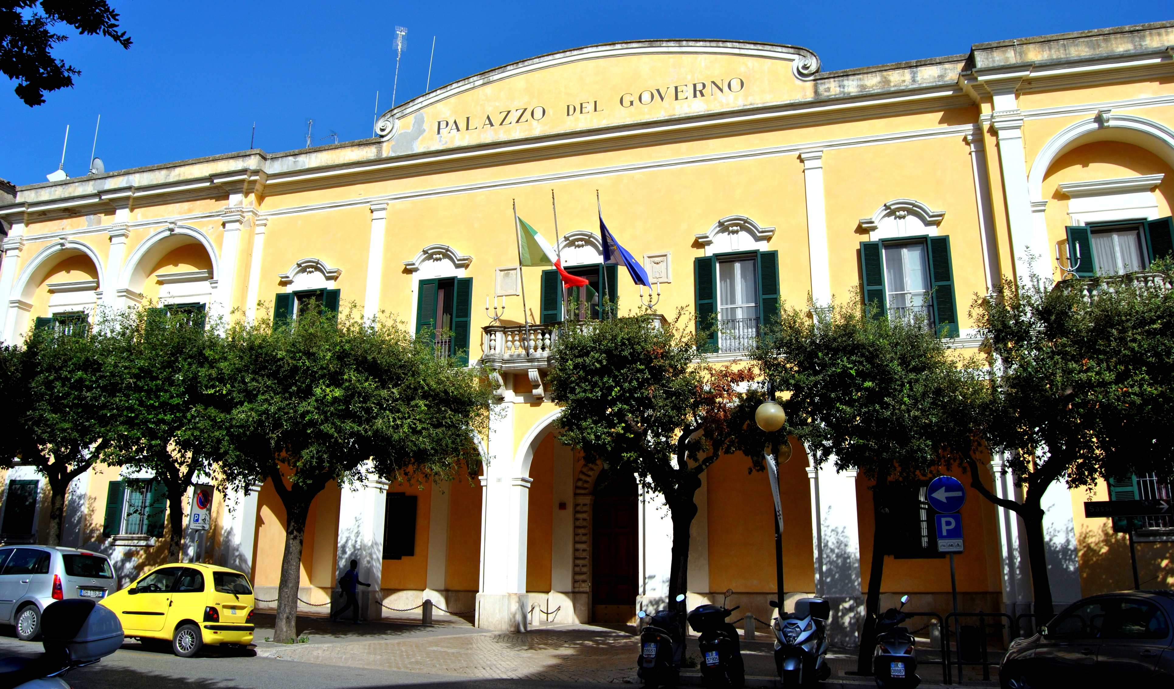 Palazzo della Prefettura This is a photo of a monument which is part of cultural heritage of Italy.